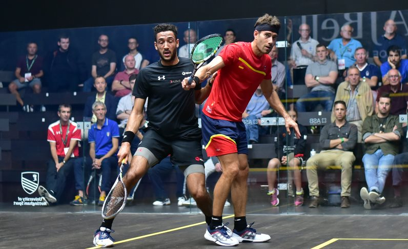 Borja Golán et Declan James 2017 aux championnats d'Europe 2017